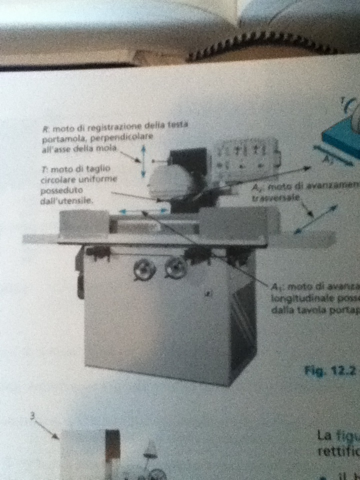 Rettificatrice